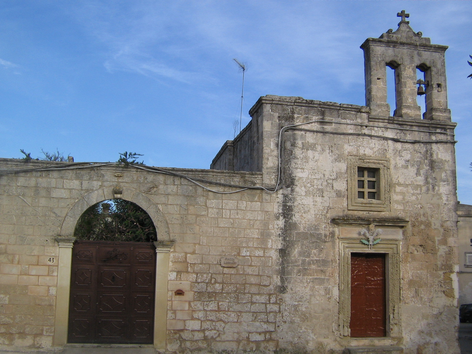 Chiesa di Sant'Oronzo Diso